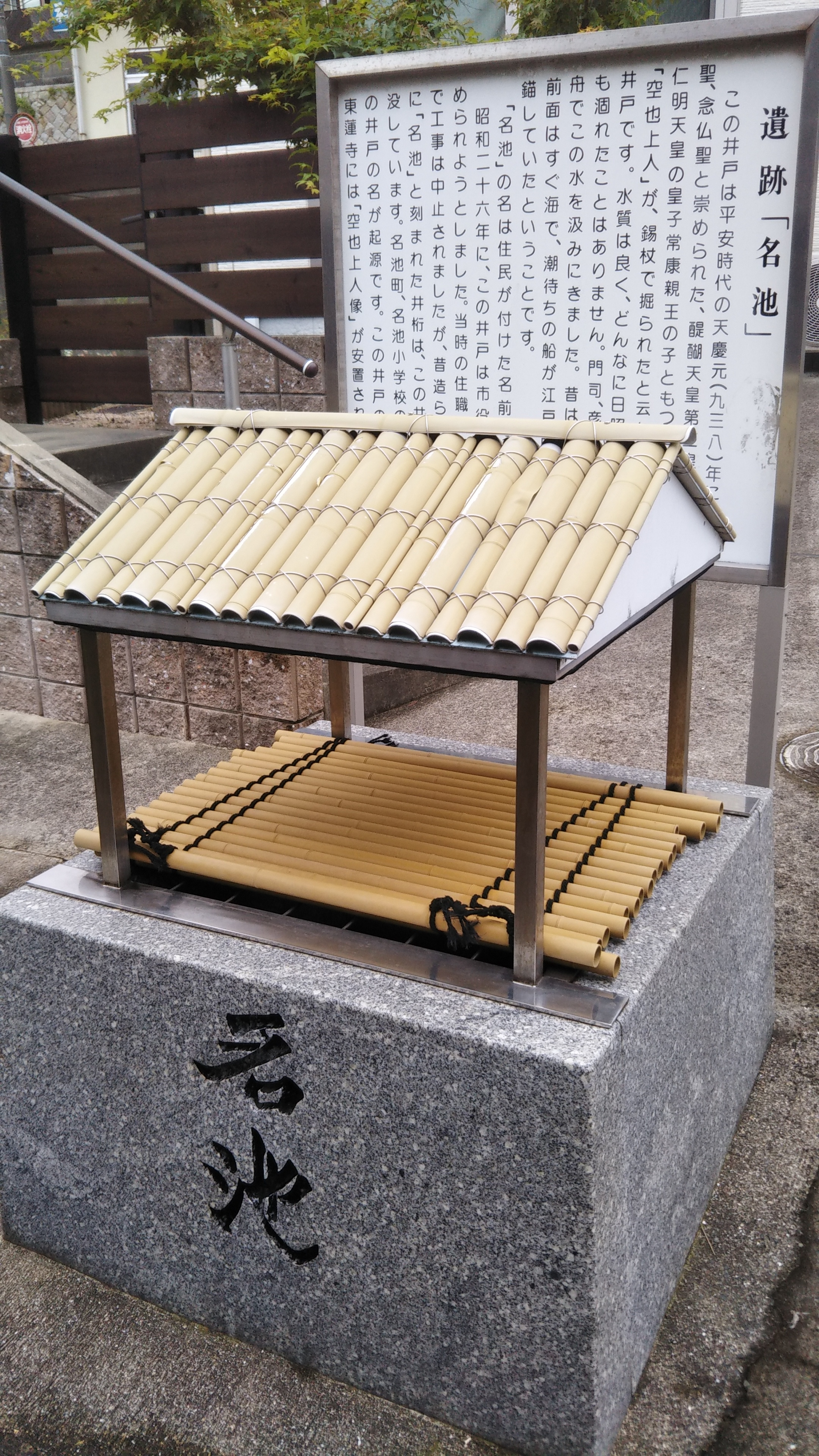 空也が錫杖で掘ったとされる名池の井戸。2019年9月28日に田中町で撮影。名池の井戸であるが町丁の地域区分上では田中町である。